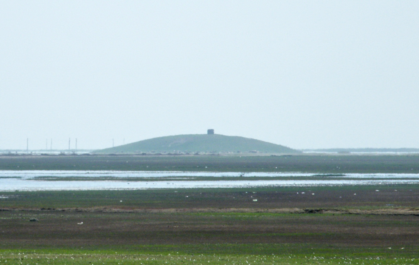 Situl arheologic "Movila din Baltă" situat în valea râului Călmăţui, sat Lişcoteanca, comuna Bordei Verde Restricţii - fără restricţii